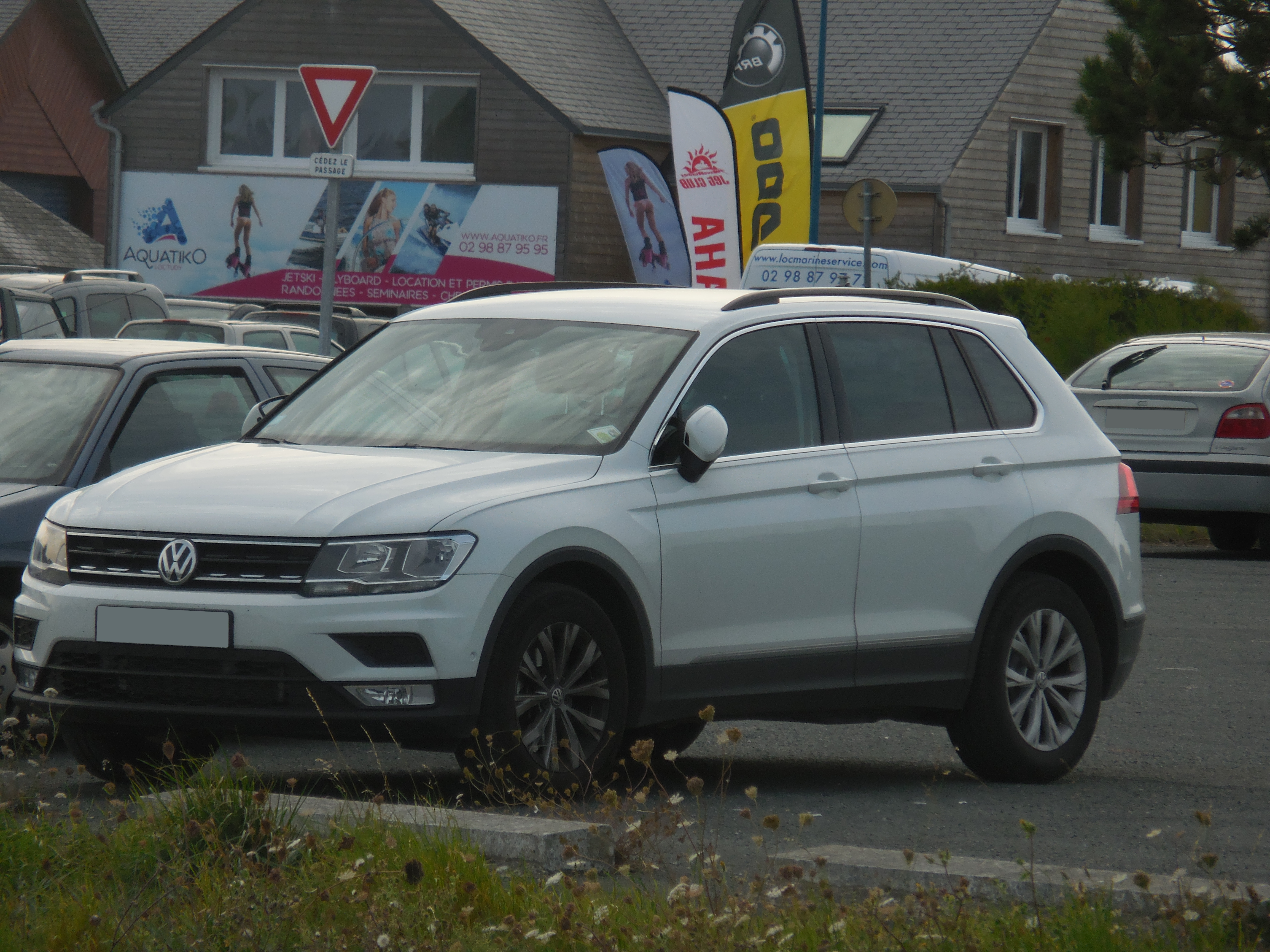 Volkswagen Tiguan II (modèle d'entrée de gamme)